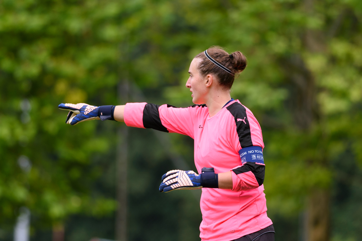 Veronika Gratz im Juli 2019 in einem Testspiel gegen FC Bayern II